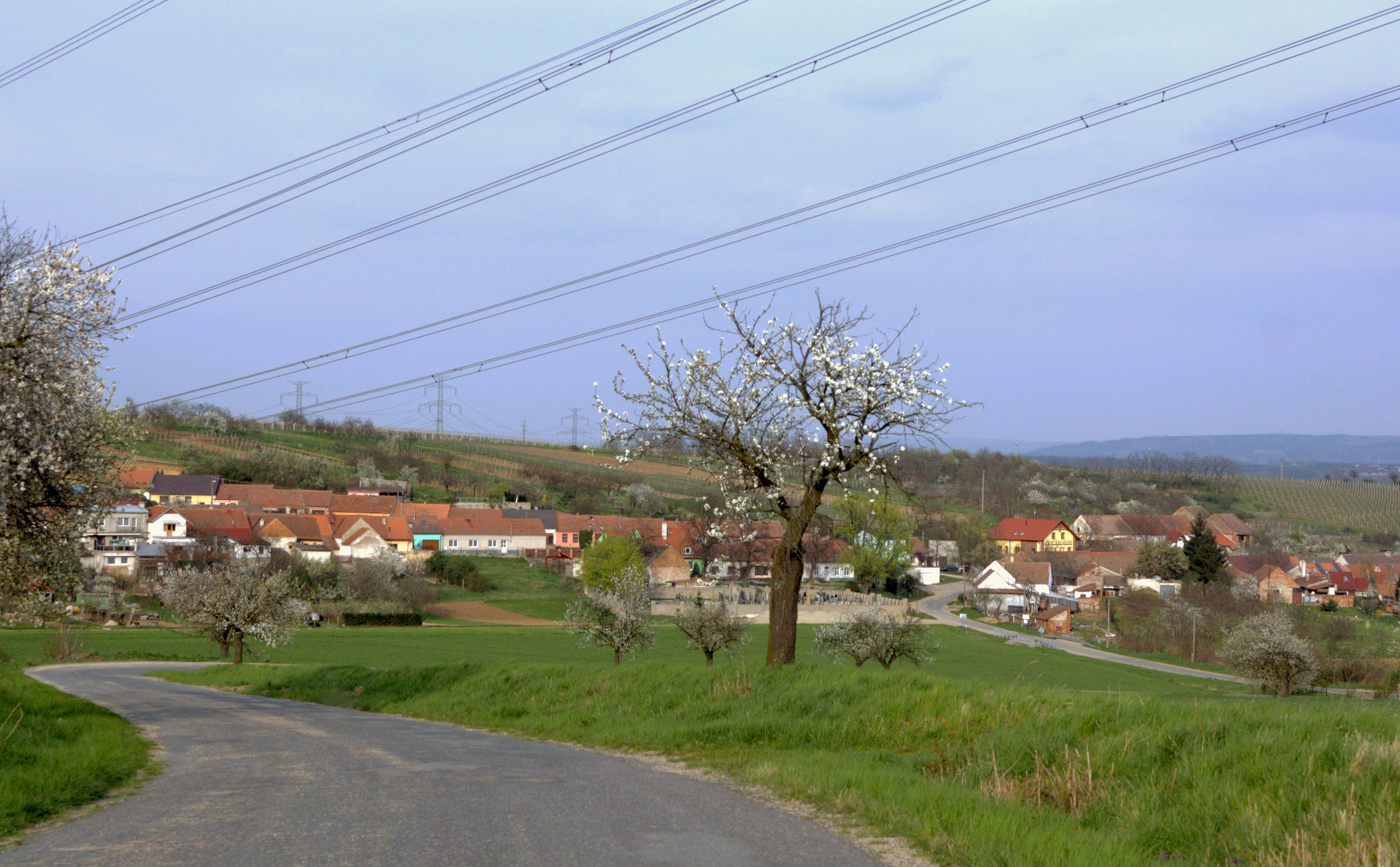 Jezeřany-Maršovice - Maršovice od západu.